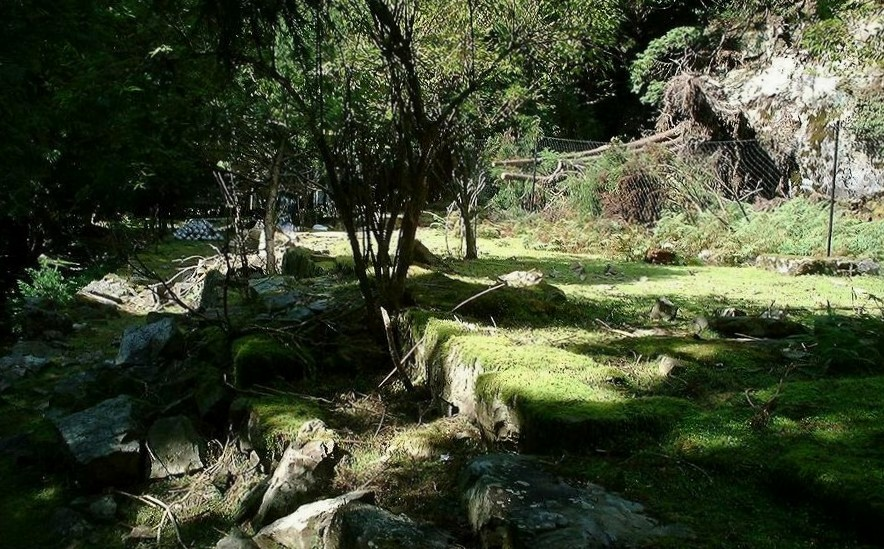 観世音寺は番外ながら月山と並んで由緒ある霊場だった。